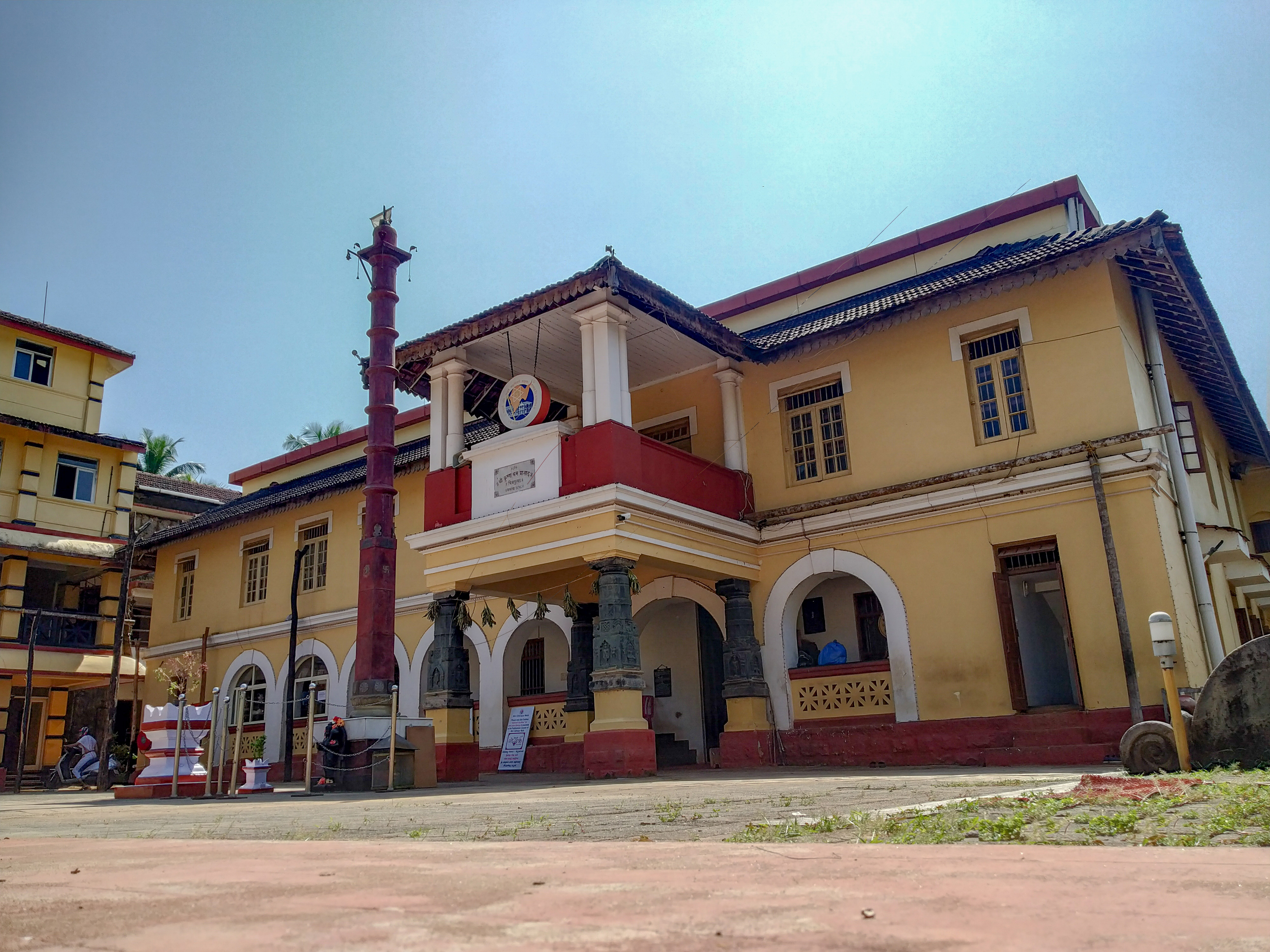 ಕನ್ನಡ: ಶ್ರೀ ಚಿತ್ರಾಪುರ ಮಠ